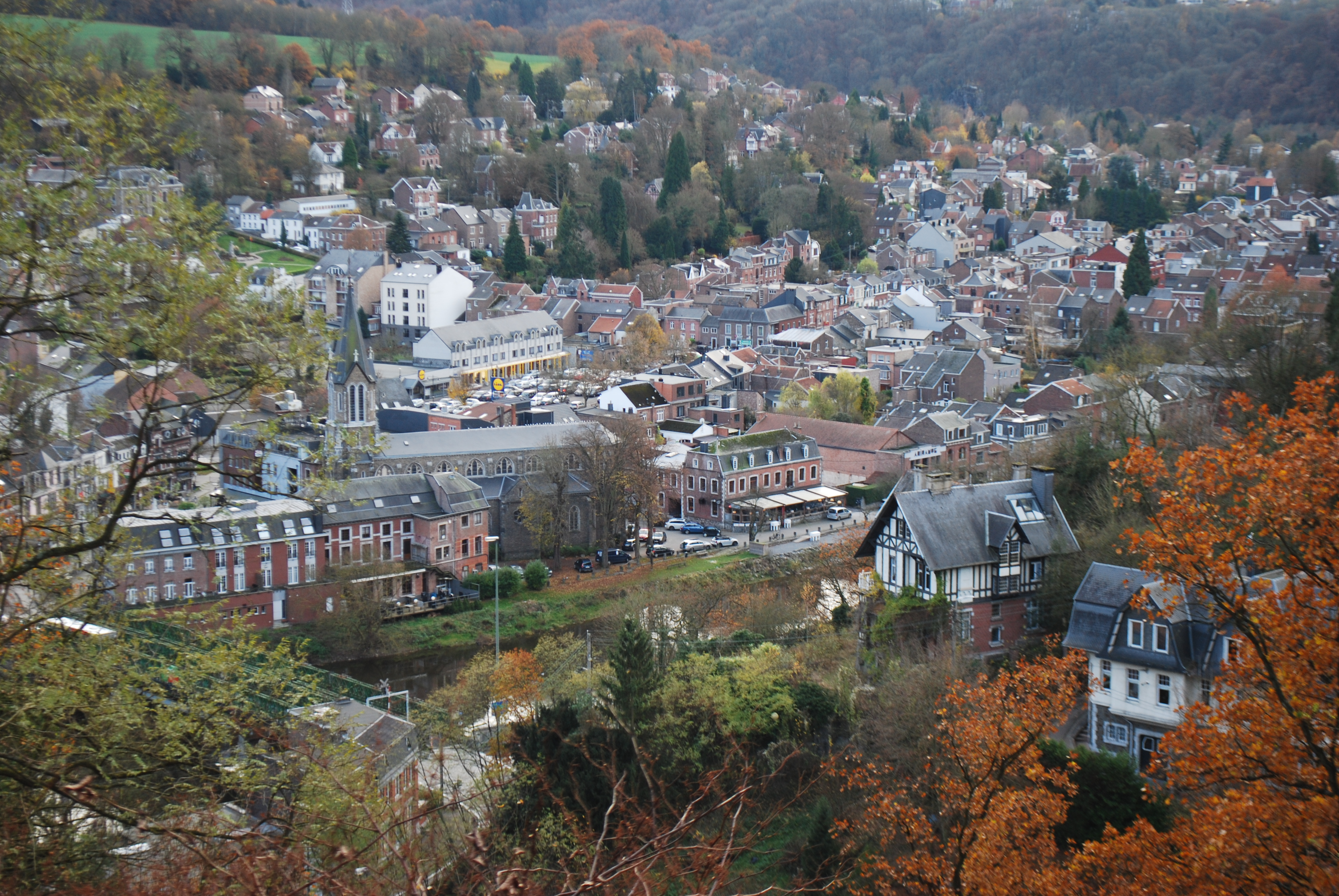 Vue du quartier de Sur-le-Mont, sur la rive gauche de l'Ourthe, au dessus de Tilff (commune d'Esneux, dans la province de Liège, Belgique).